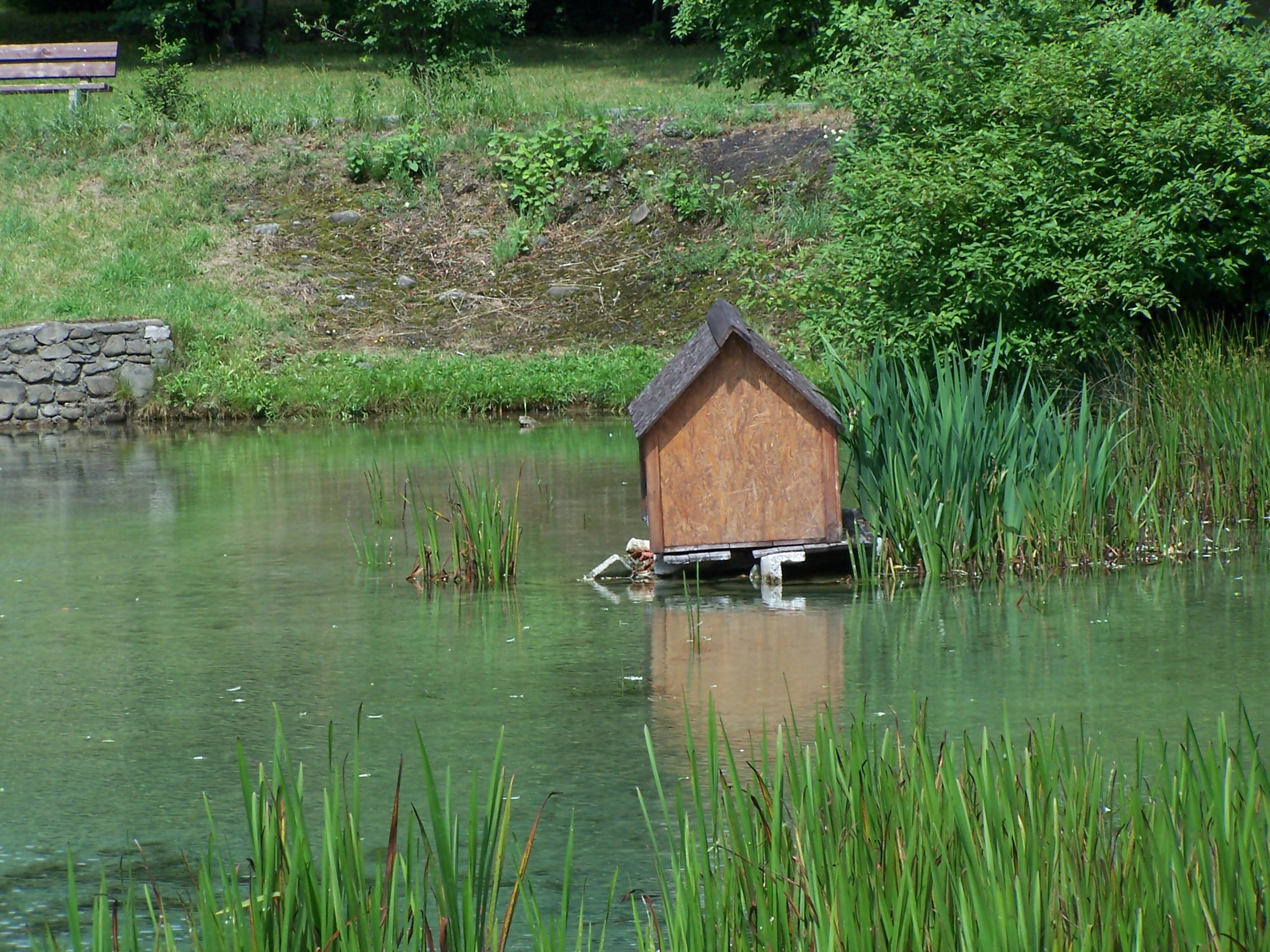 Pomnik Przyrody Wywierzyska w Strzemieszycach Wielkich (Dąbrowa Górnicza). Domek dla Kaczek :) foto: geograf.gp